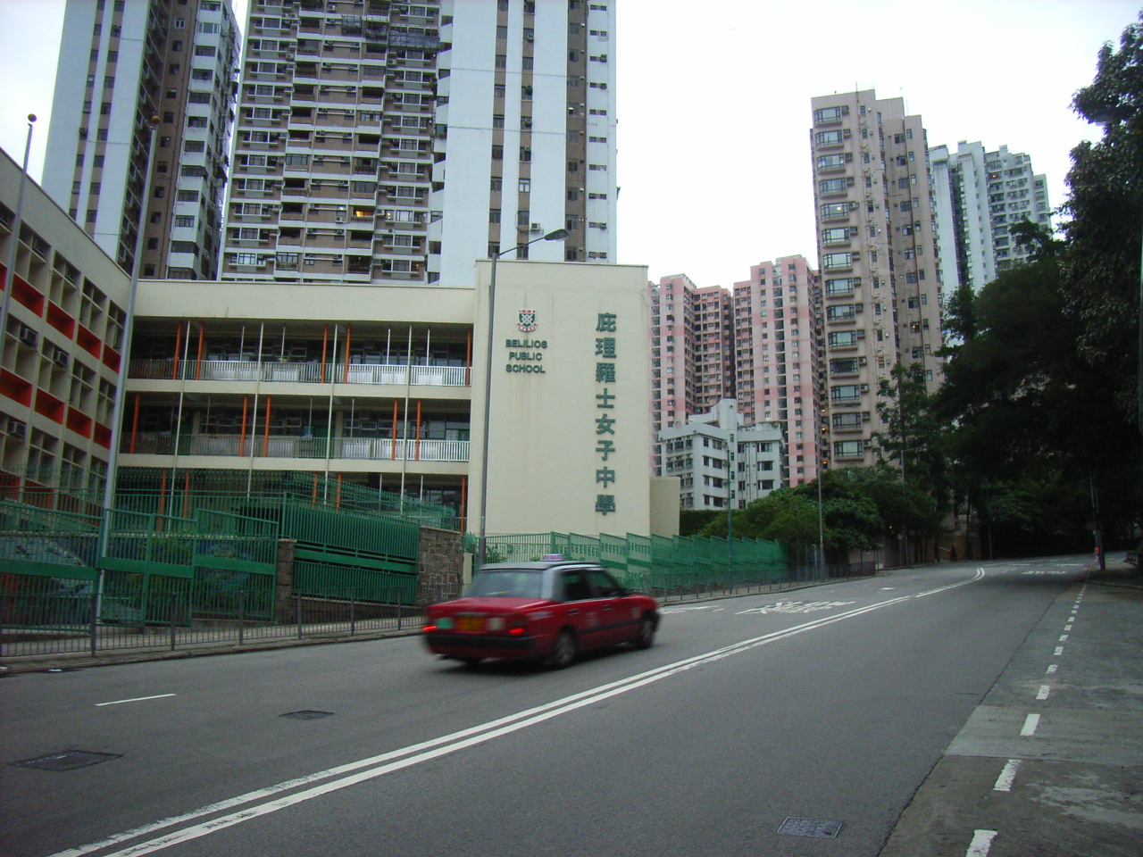 中文（香港）: 庇理羅士女子中學, 天后廟道51號